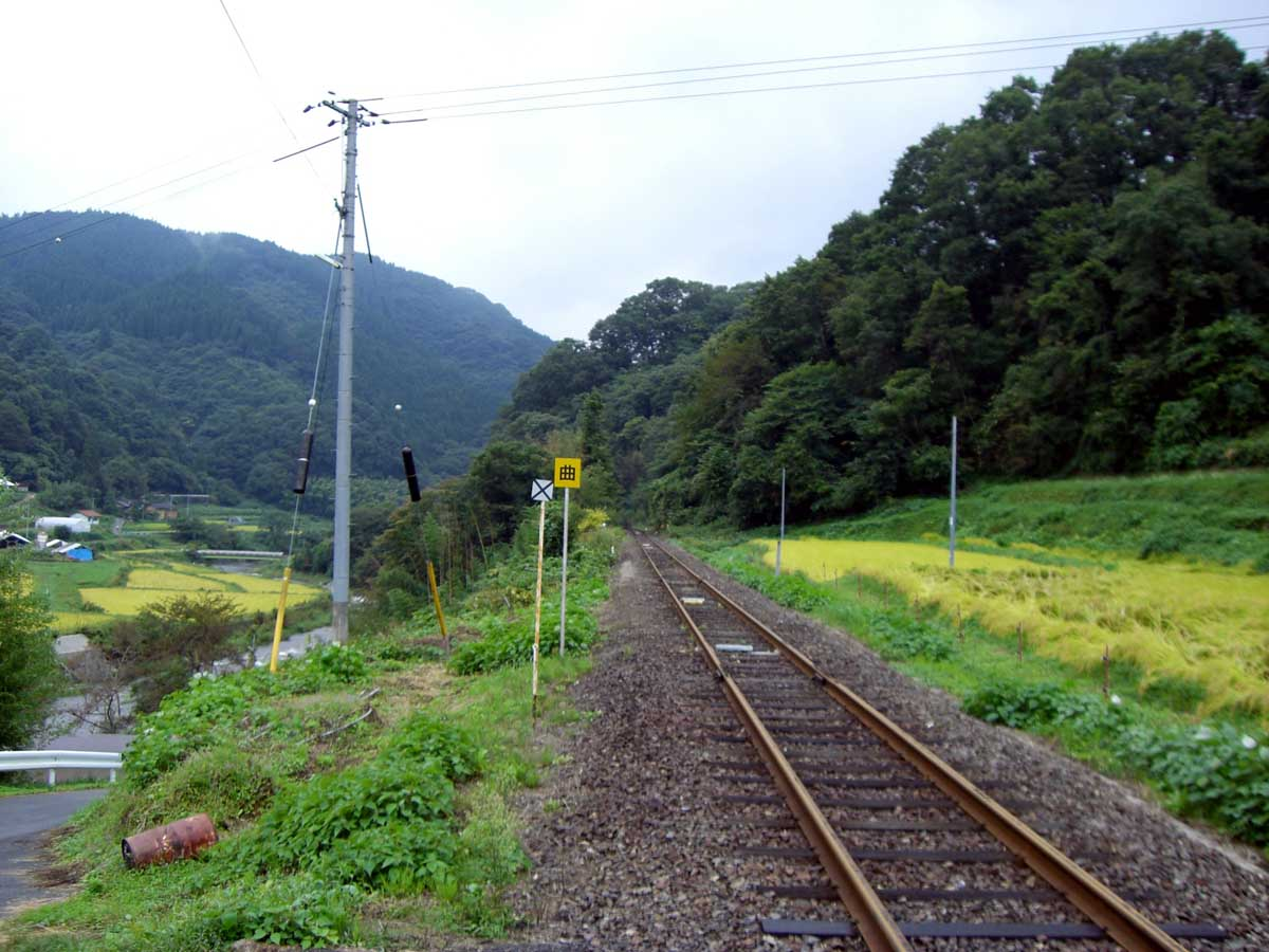 撮影地、撮影場所…JR芸備線、内名駅、東城方面。撮影年月日…2006年9月17日